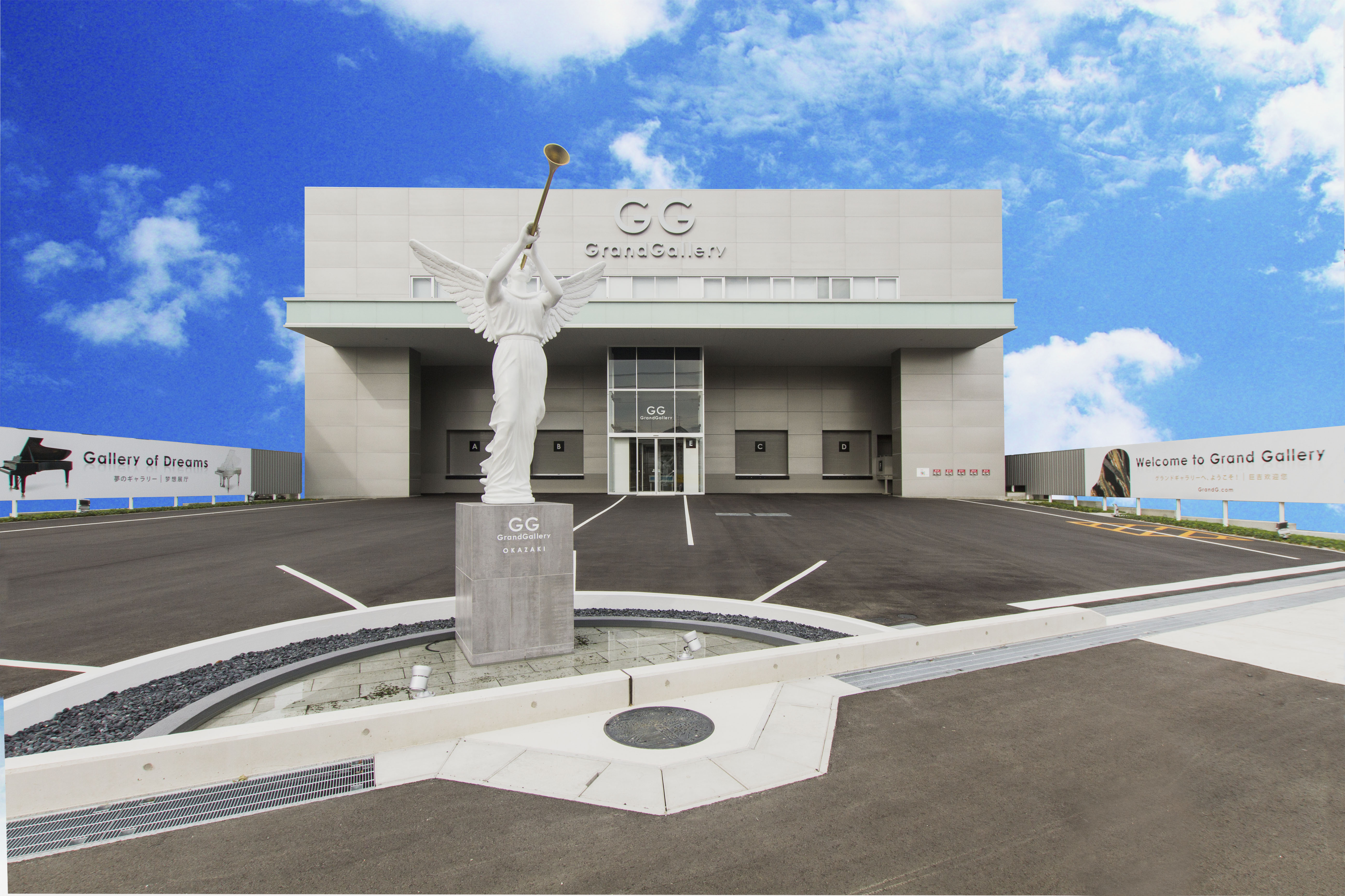 グランドギャラリー岡崎